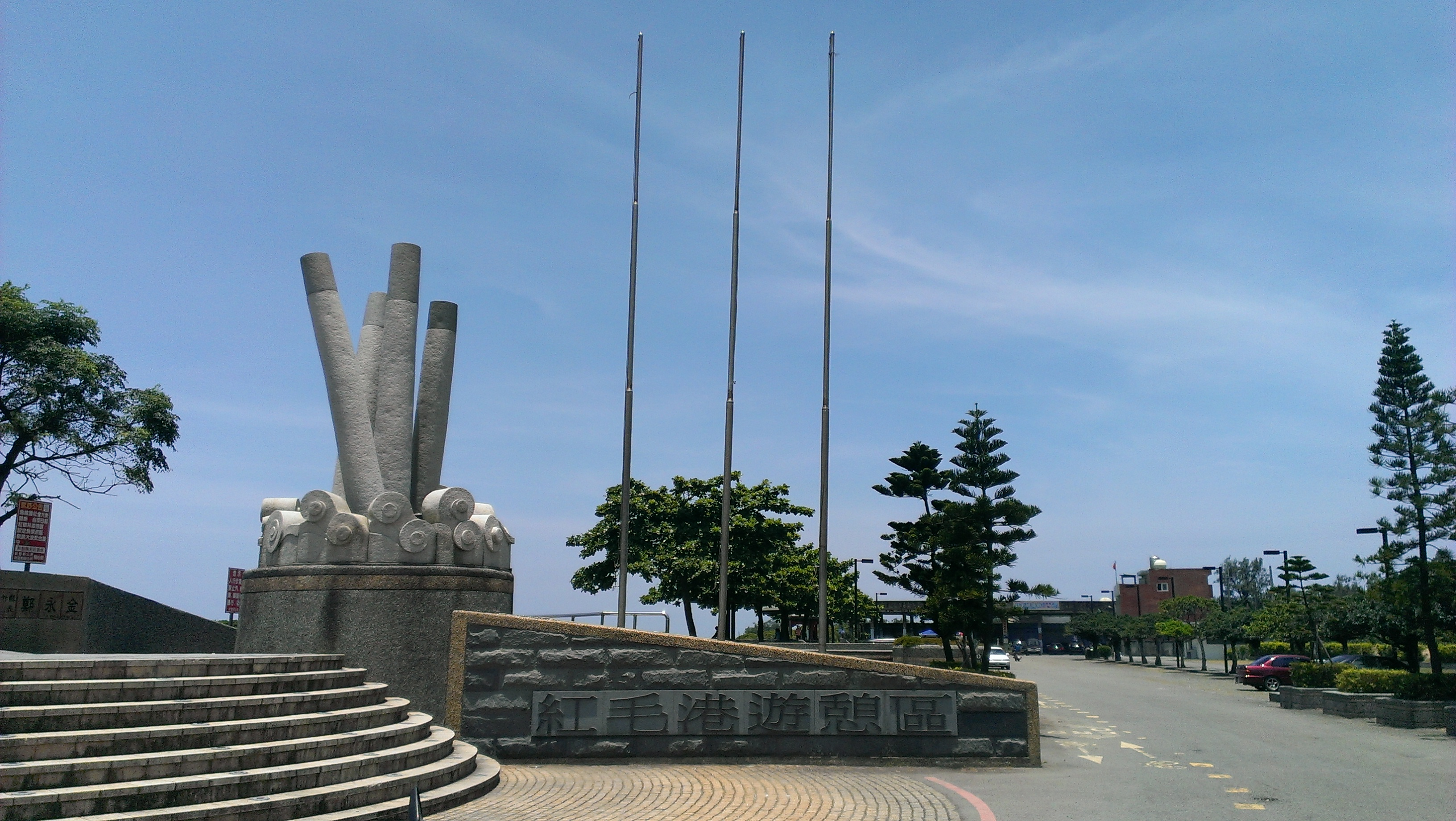 中文（台灣）: 紅毛港遊憩區